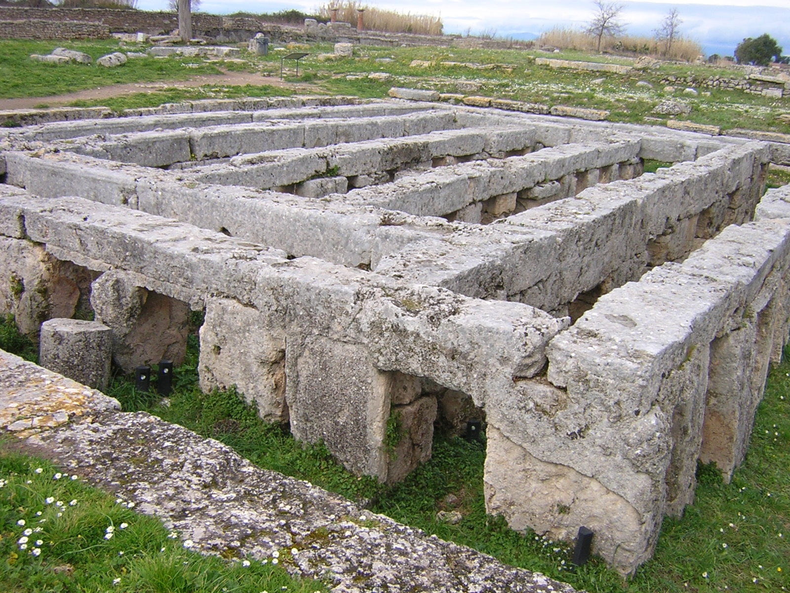 Gymnasium romano a Paestum.